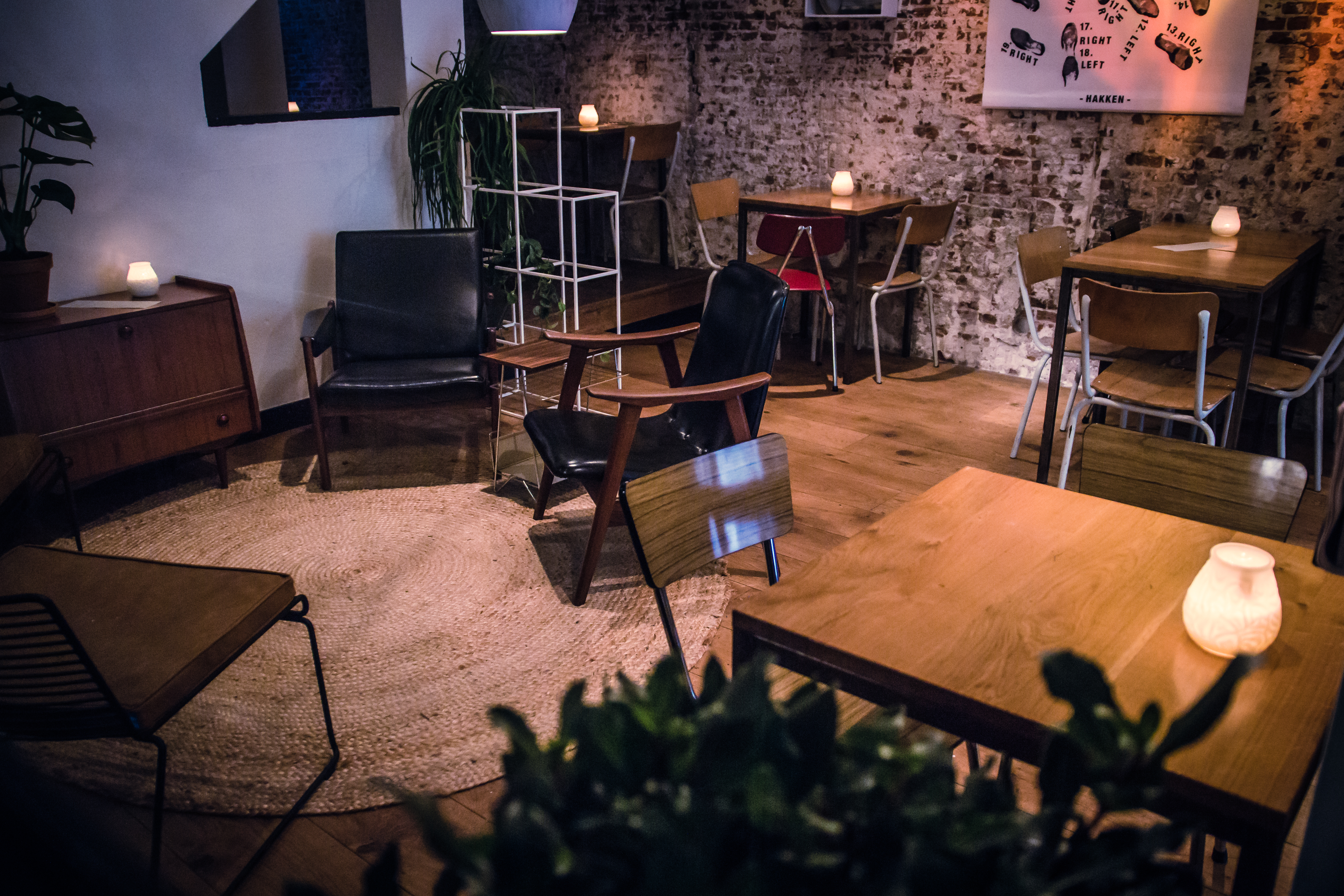 Utrecht